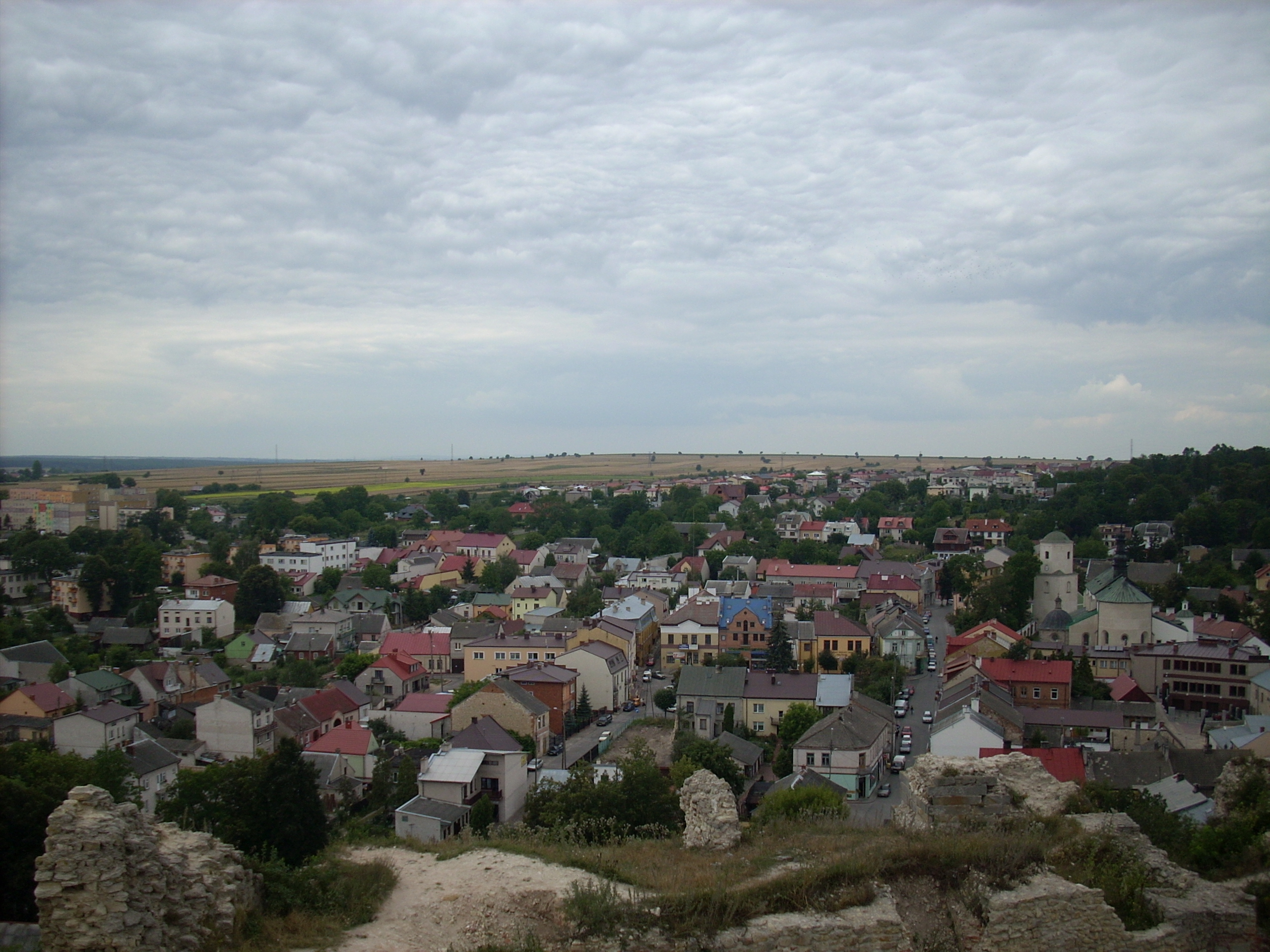 Iłża - widok ze średniowiecznej baszty na zabudowę miejską